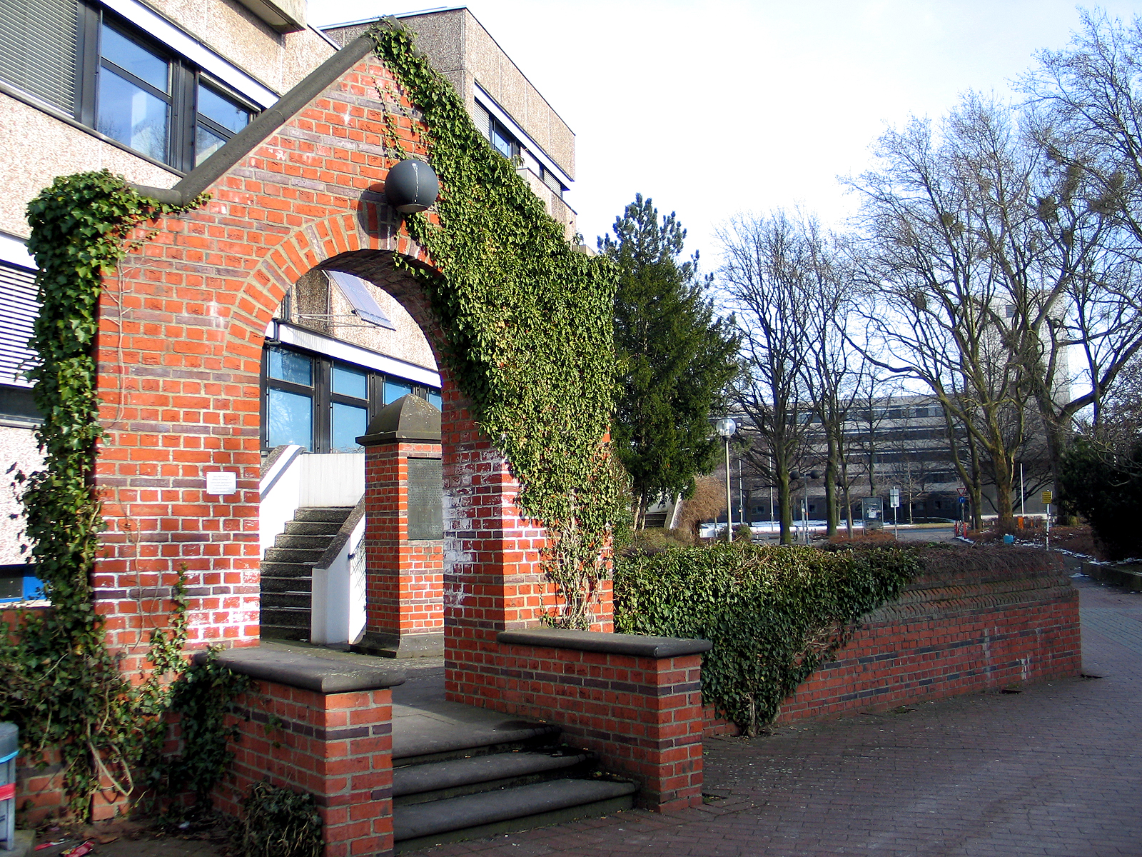 Blick auf das 1990 errichtete Mahnmal zur Erinnerung an jüdisches Leben in der Ohestraße von Hannover (Stadtteil Calenberger Neustadt zwischen den Gebäuden des Berufsschulzentrums Hannover ...